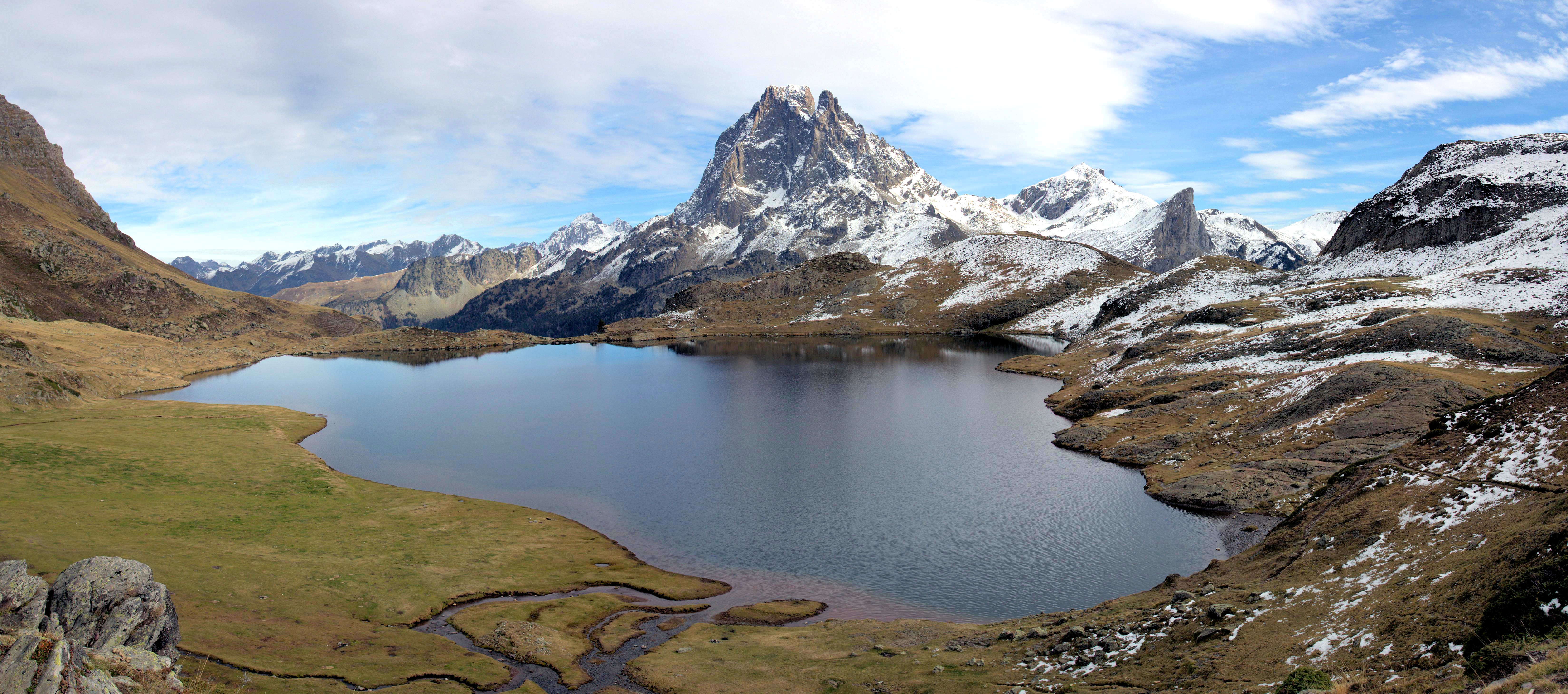 Lac Gentau, Béarn, France